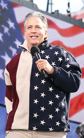 Jon Stewart